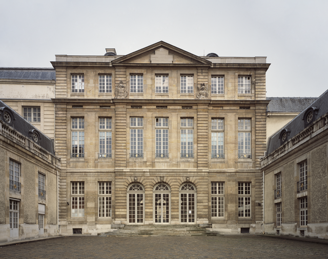 Vue générale de l'hôtel de Rohan, prise du côté de la rue Vieillle-du-Temple.